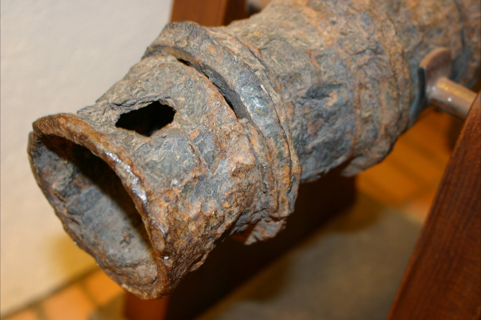 Fallbyssa úr járni frá 15. öld, sem fannst á Bessastöðum árið 1888.